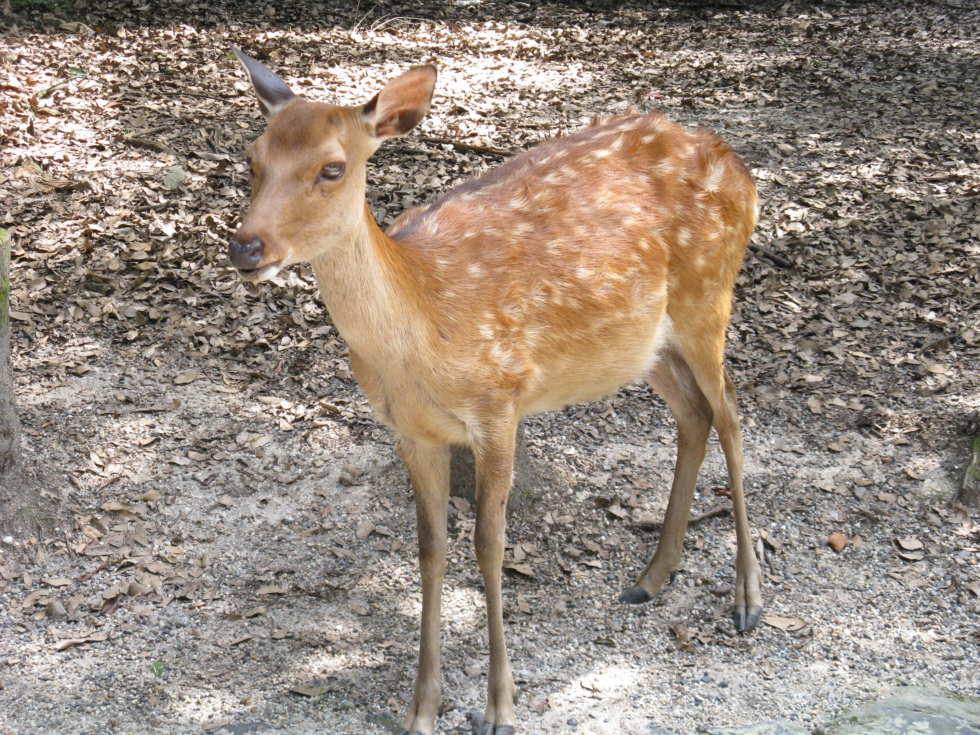 Scientific name Cervus nippon centralis